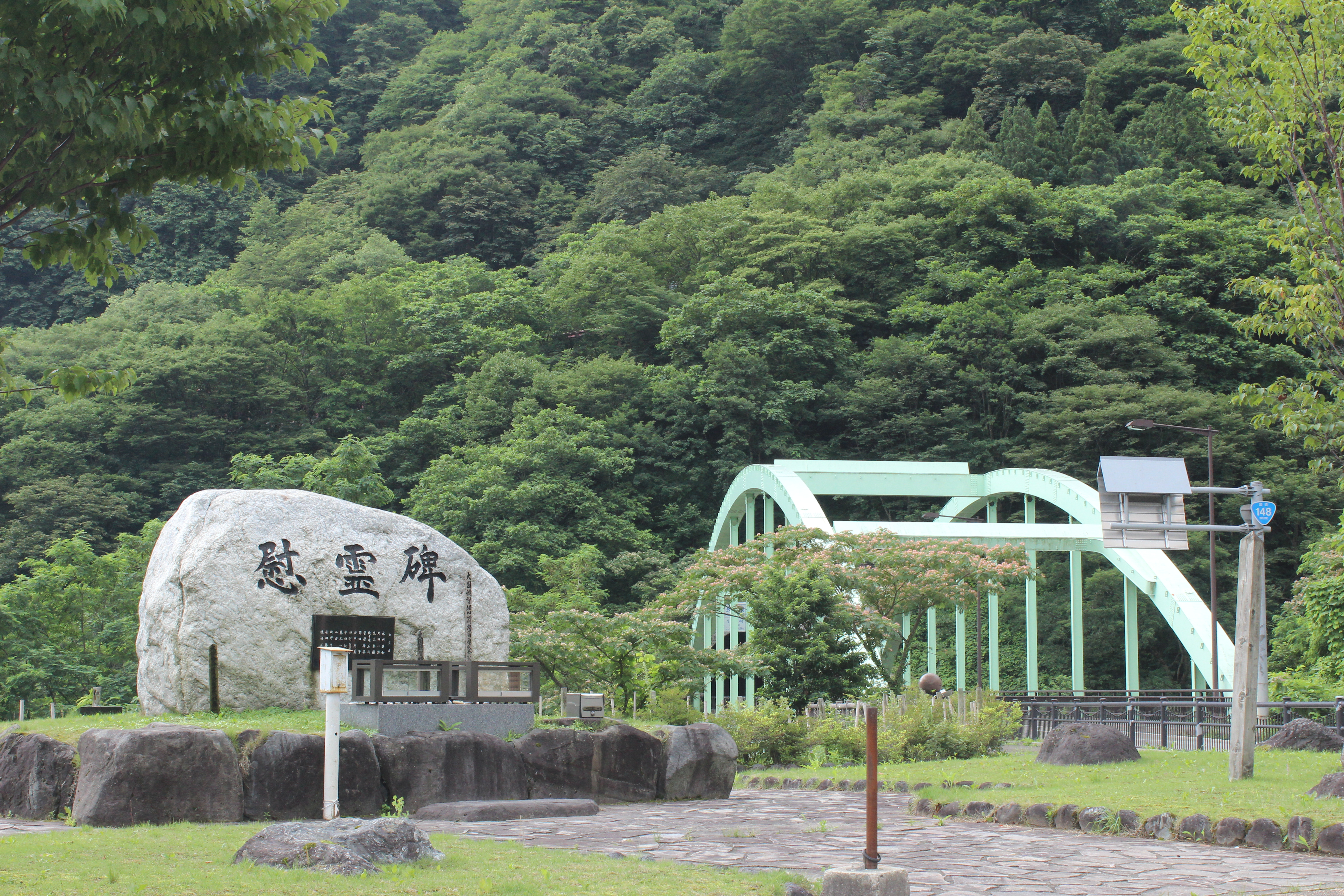 国界橋（1998年完成）と1996年に発生した蒲原沢土石流災害の慰霊碑。国道148号線。新潟－長野県境。